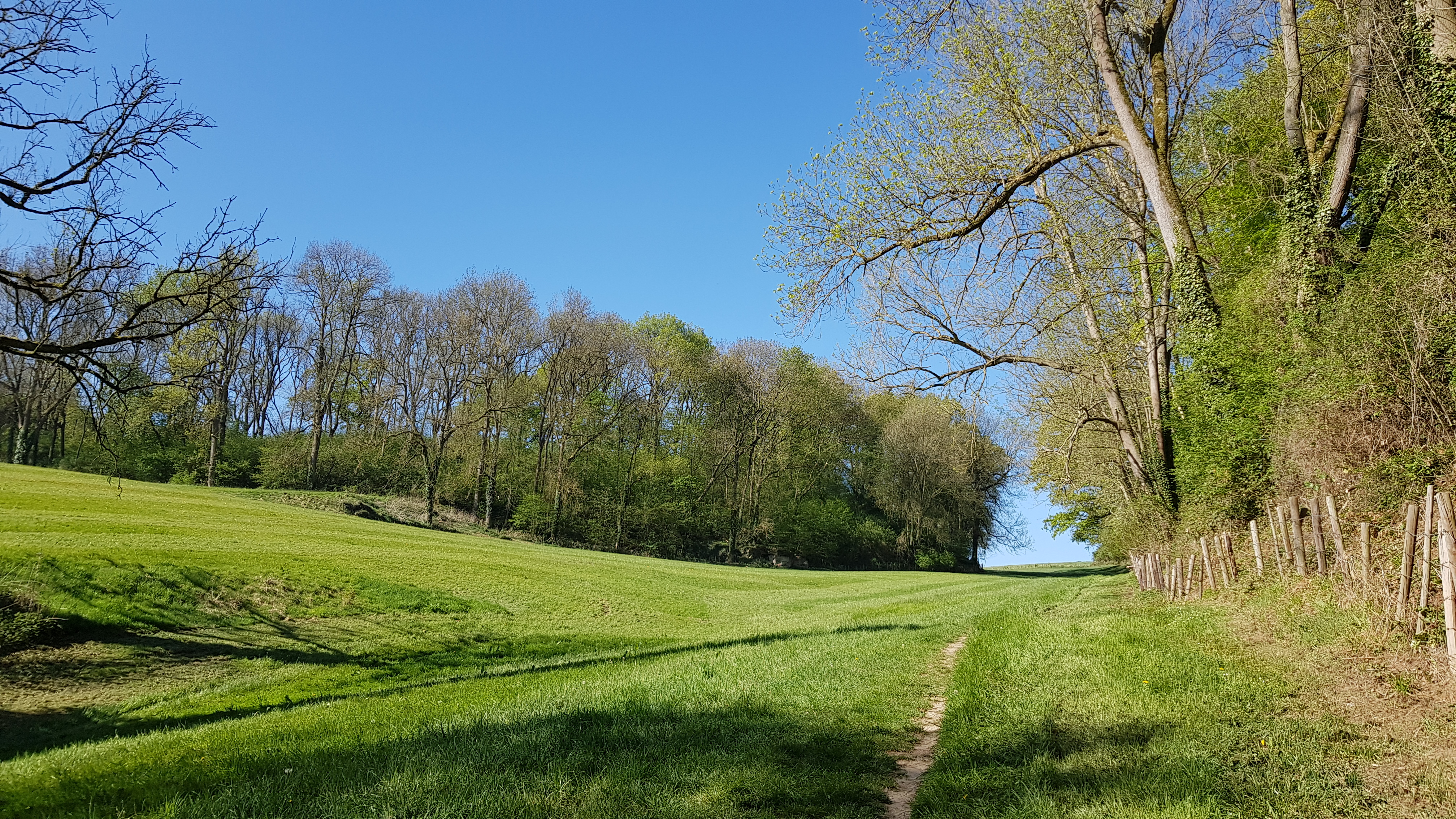 Groeve achter Lemmekenskoel, Sibbe, Nederland